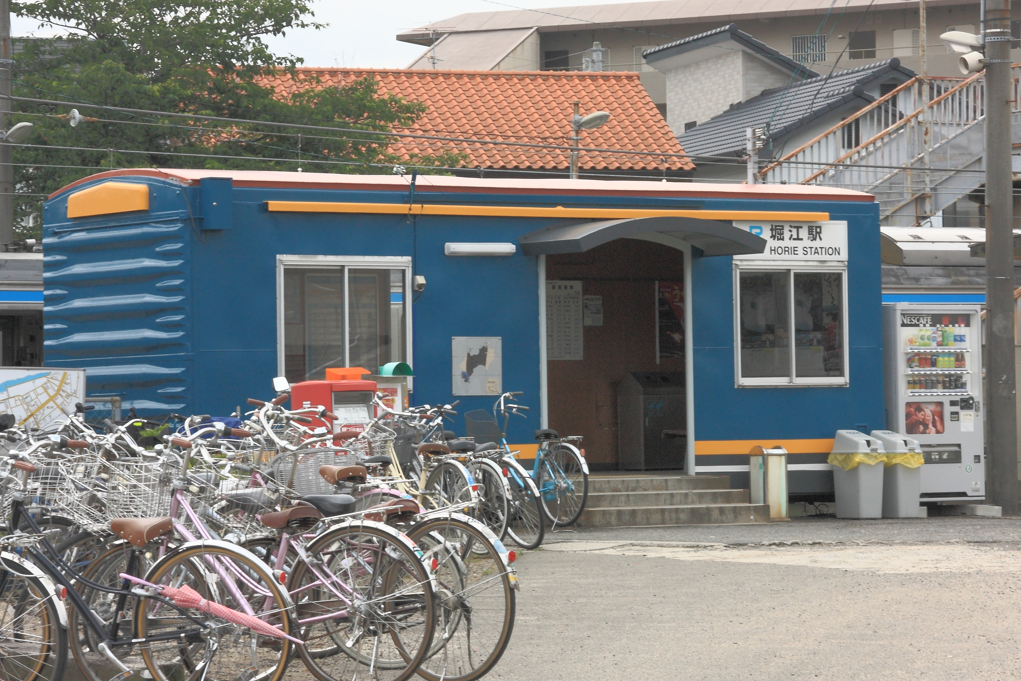 JR予讃線 堀江駅構内及び駅舎 09/06/04現在